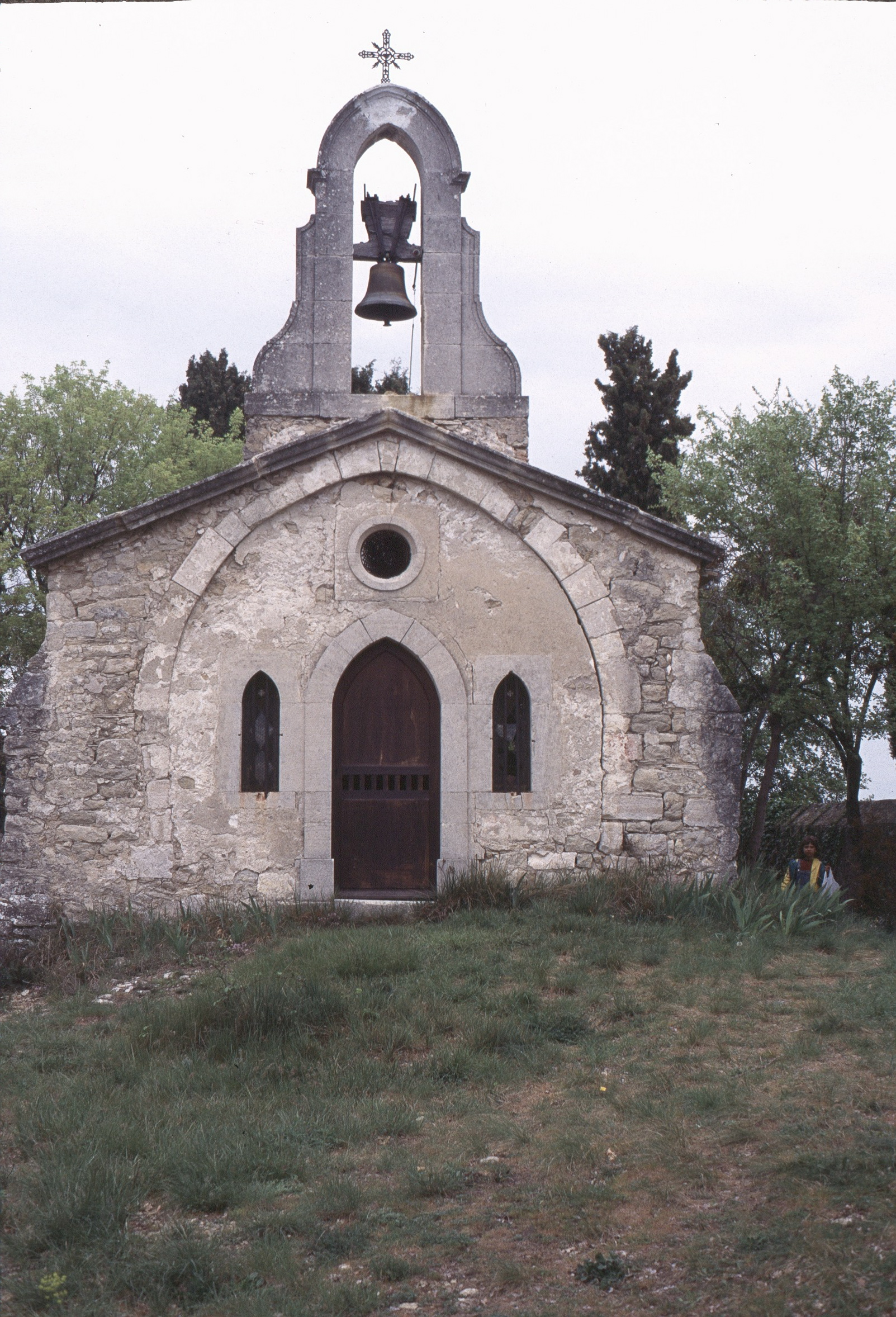 Kapelle Saint-Michel am Friedhof in Lurs